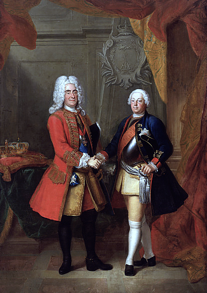 Bronzesaal, Stadtschloss, Potsdam